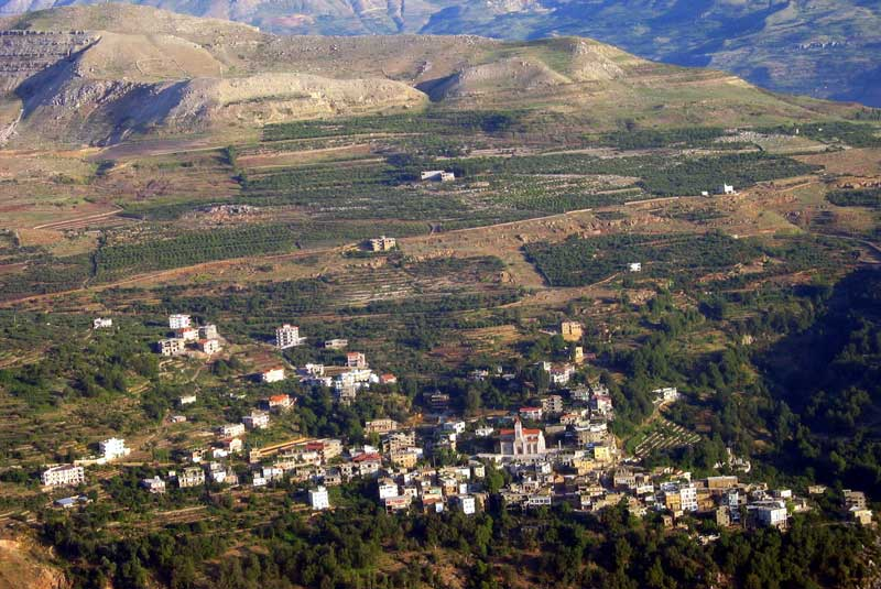 Cette photo a ete prise le 18 juin 2004 a partir de Ehden par moi-meme youcroft. Elle donne une tres bonne idee du village de Kfarsghab.